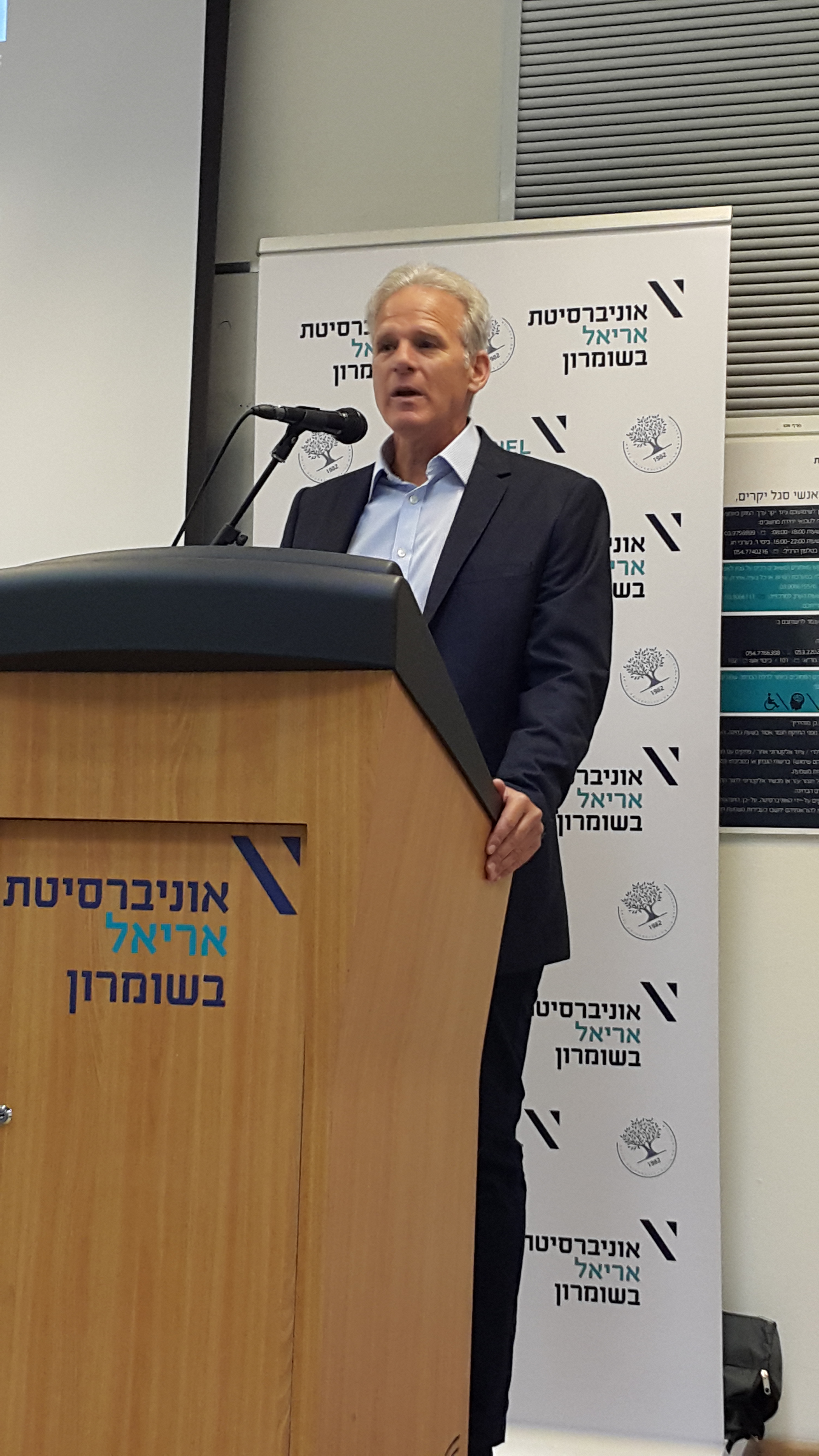 מייקל אורן